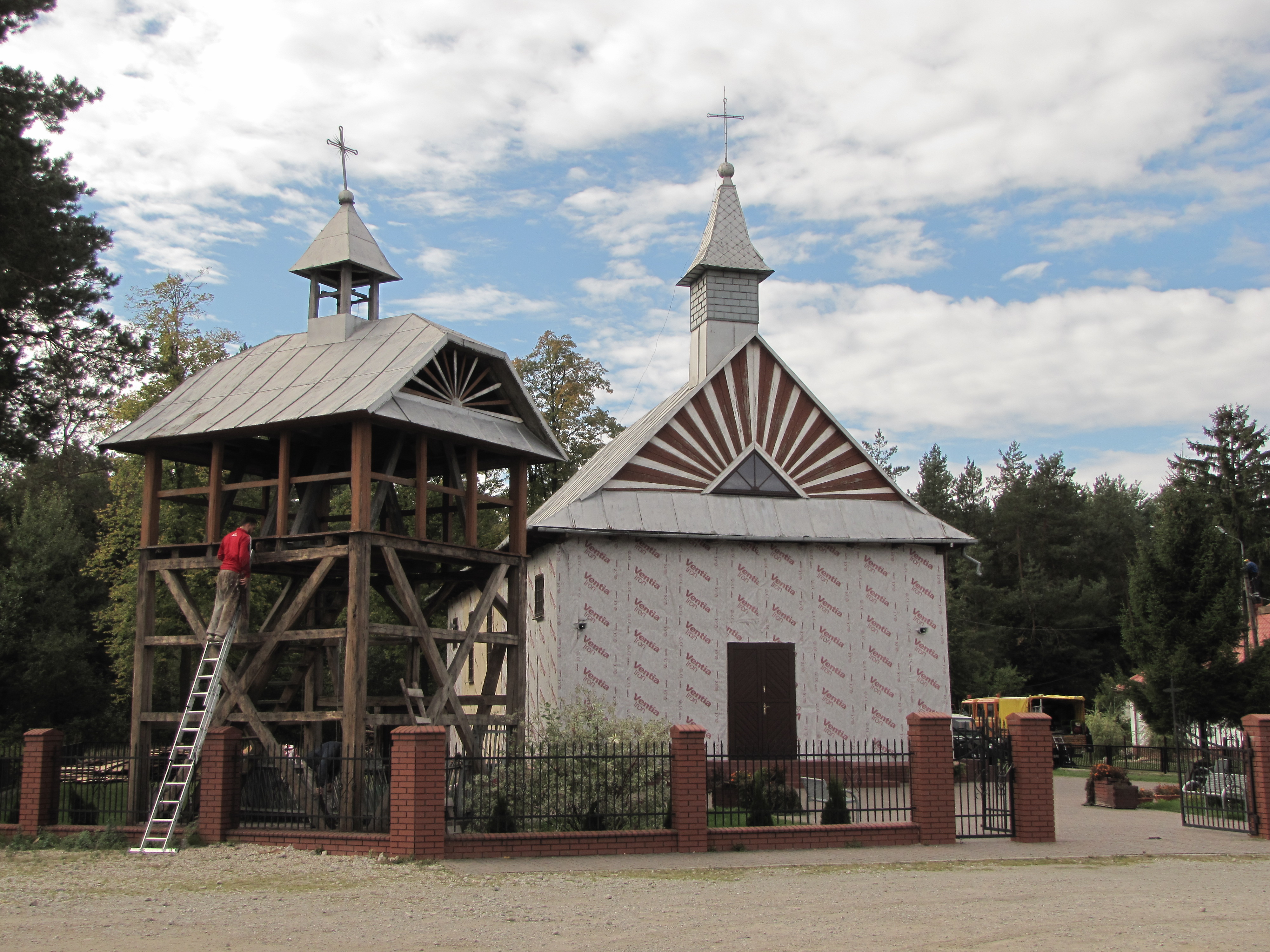 Kościół par. p.w. Macierzyństwa NMP, 1936 Łuzki